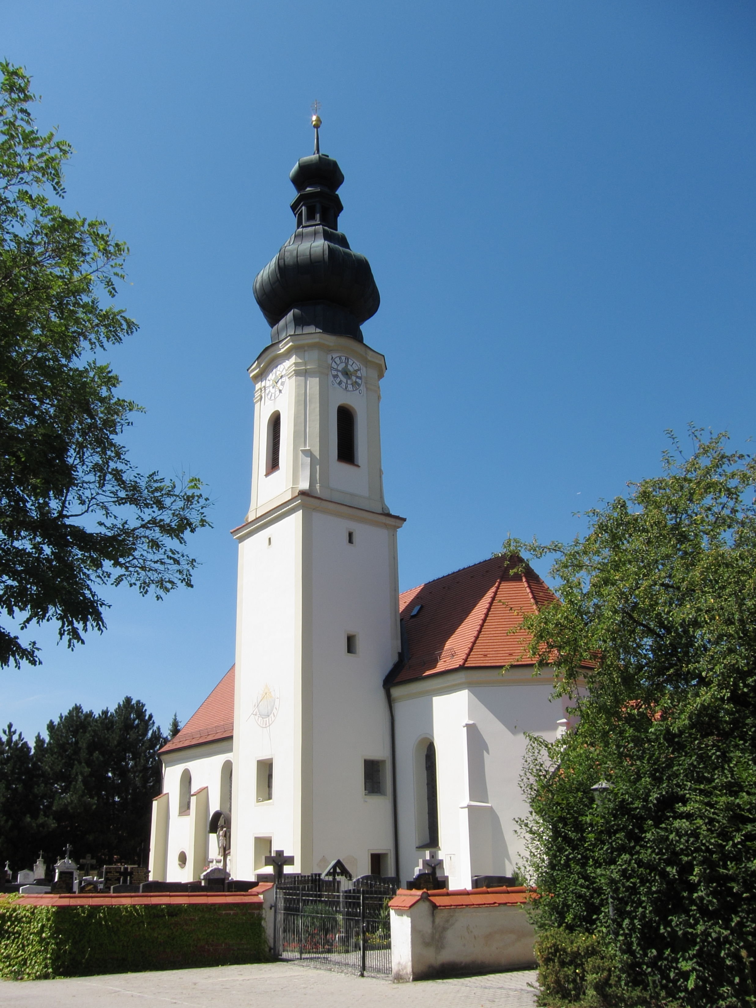 Buch am Buchrain; kath. Pfarrkirche St. Martin, Saalbau mit eingezogenem Chor und Kirchturm mit Spindelhelm auf spätmittelalterlicher Grundlage, von Anton Kogler 1707 erneuert und von Johann Baptist Lethner 1760/2 überarbeitet; mit Ausstattung